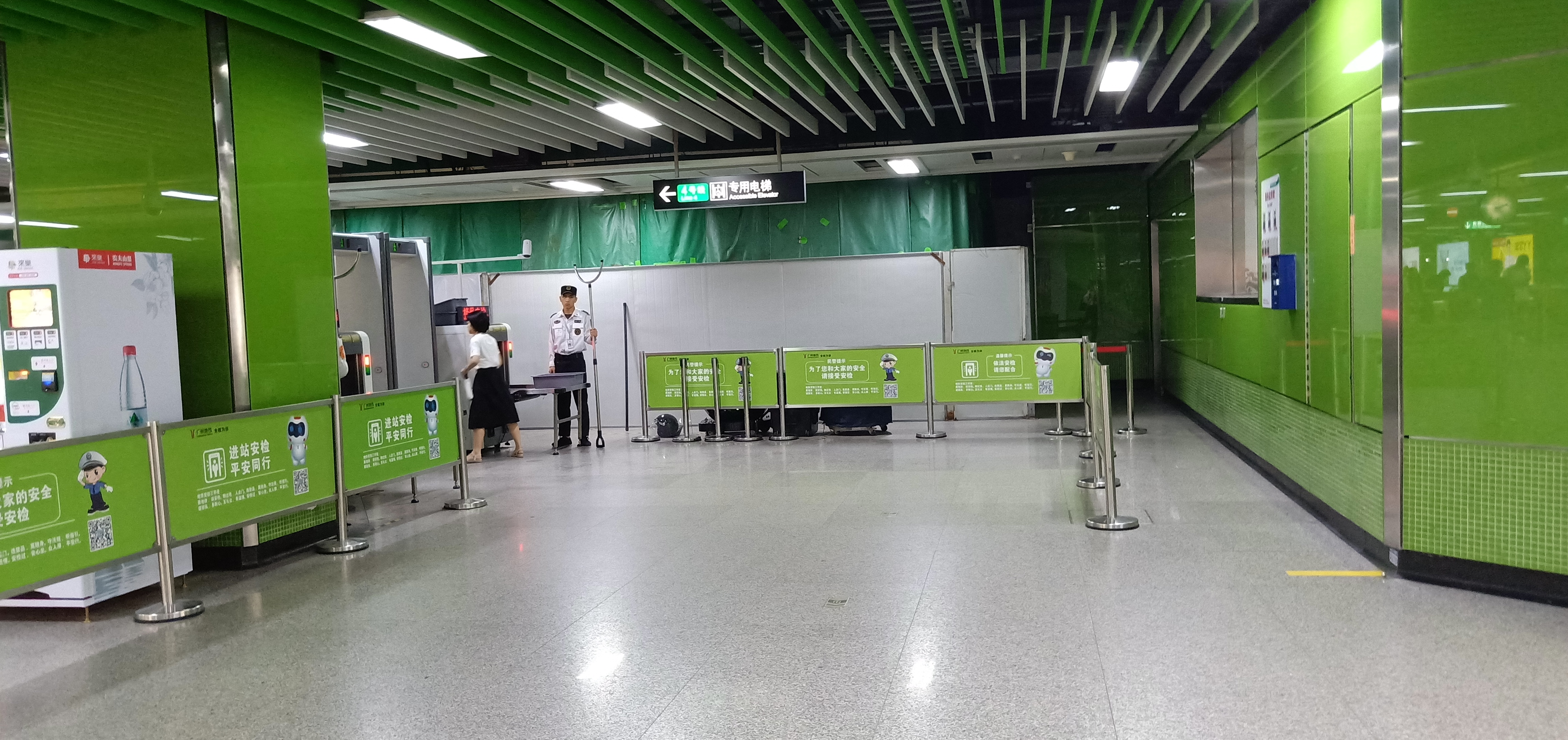 粵語: 2019年4月28號，廣州地鐵4號綫黃村站範圍嘅安檢位西邊（後邊）堆棚架，嗰時21號綫重係個工地。